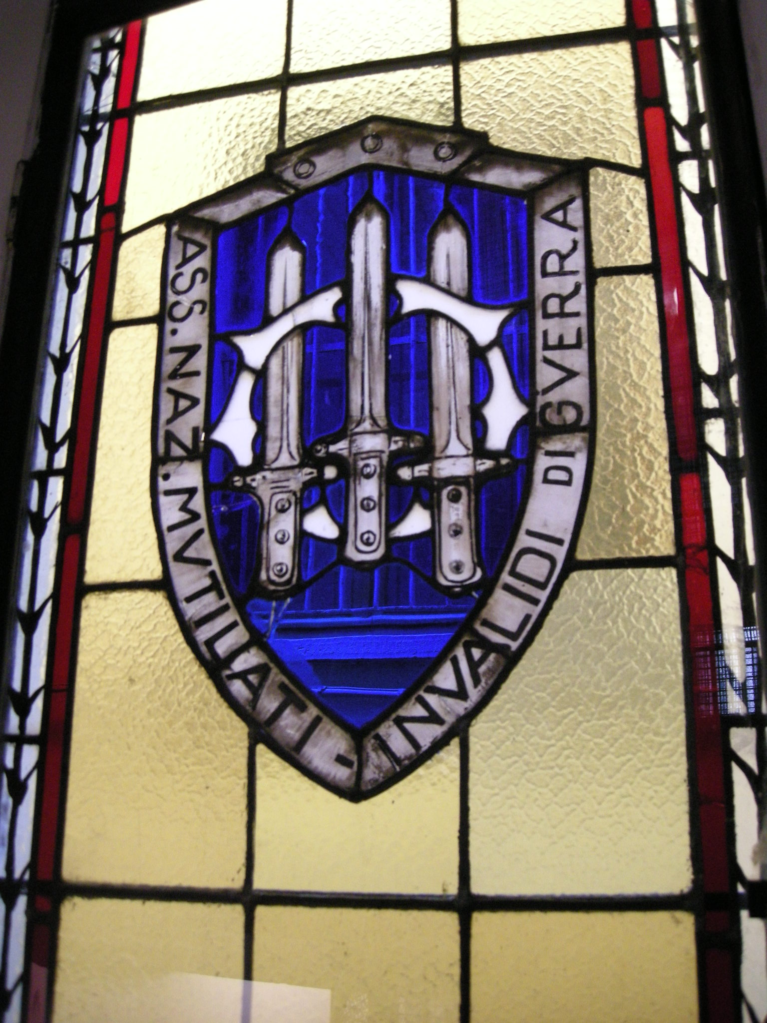 Casa del Mutilato (Lucca) 06 stemma associazione nazionale invalidi-mutilati di guerra